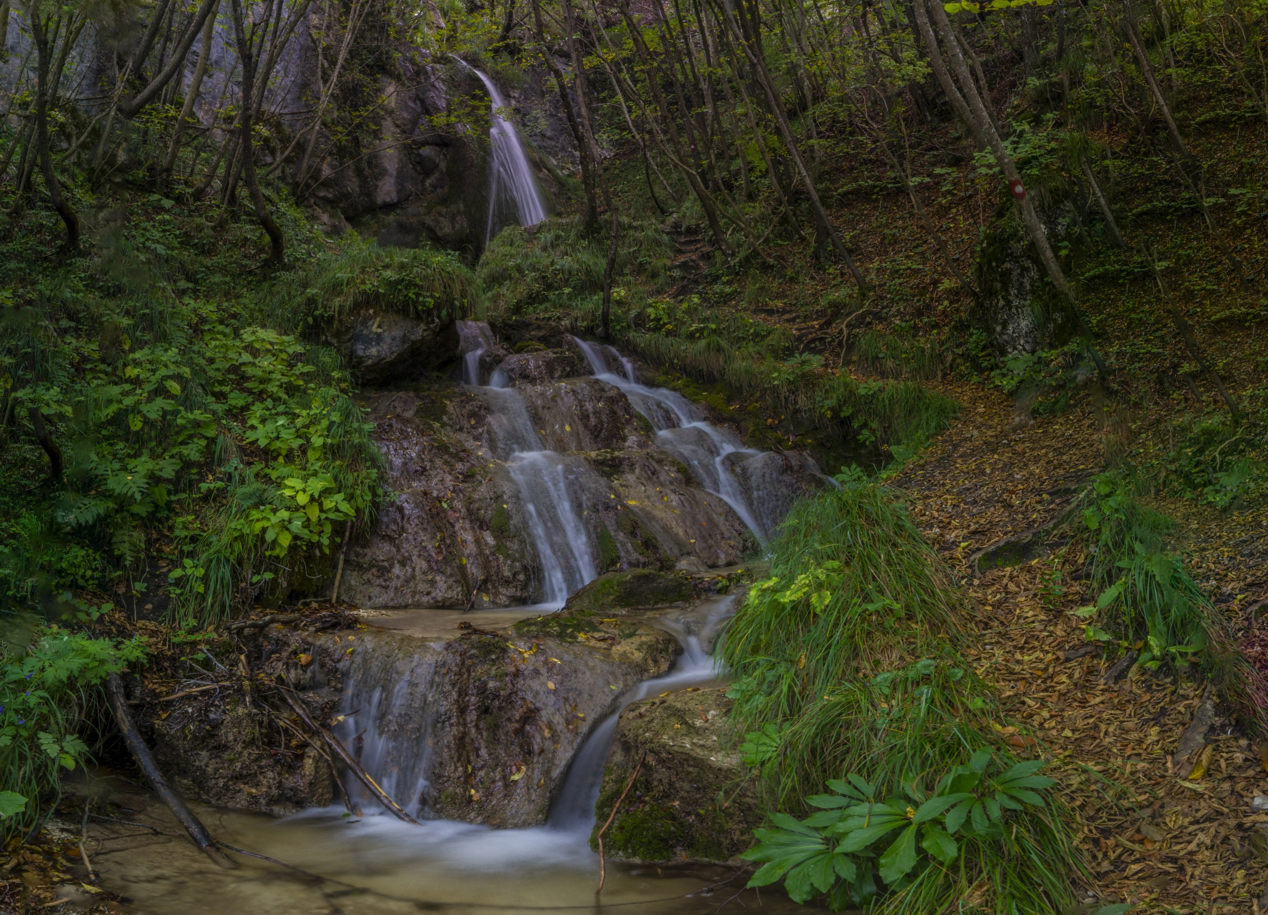 Sopote waterfall in Žumberak mountains